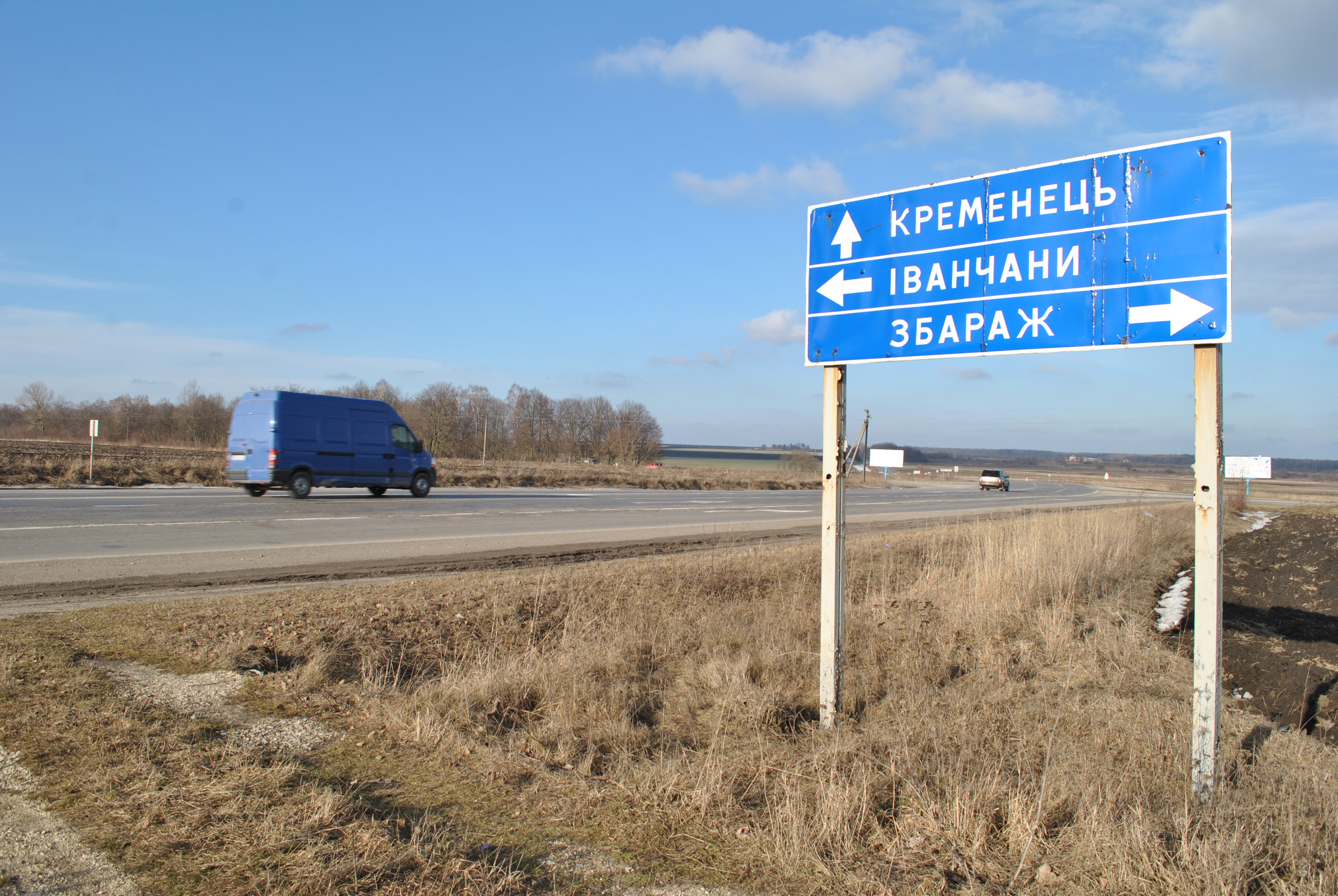 Автошлях М 19 біля м. Збараж Тернопільської області.